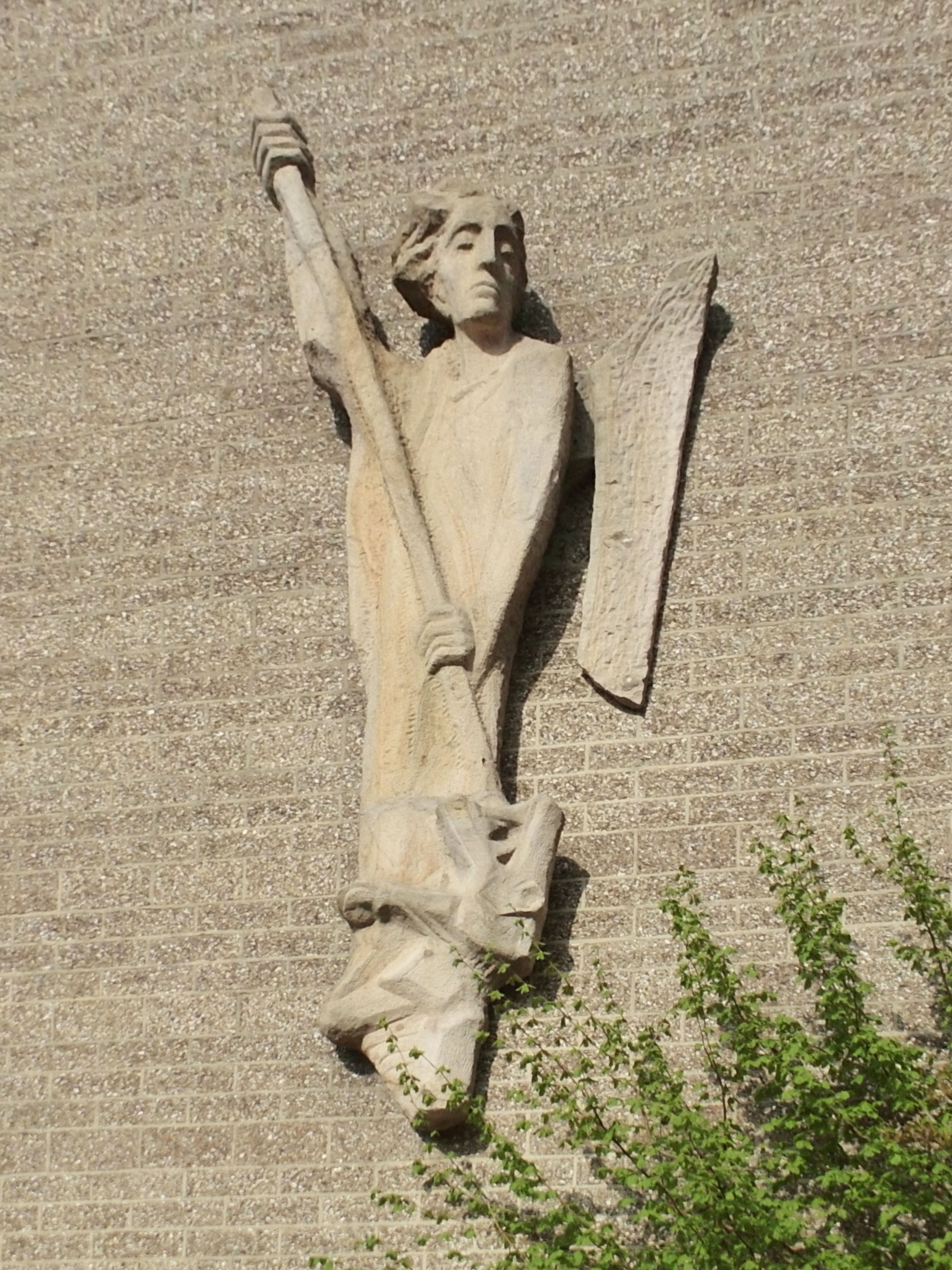 Darstellung des Erzengels Michael an der Außenwand der katholischen St.-Michael-Kirche in Salzgitter-Lebenstedt.